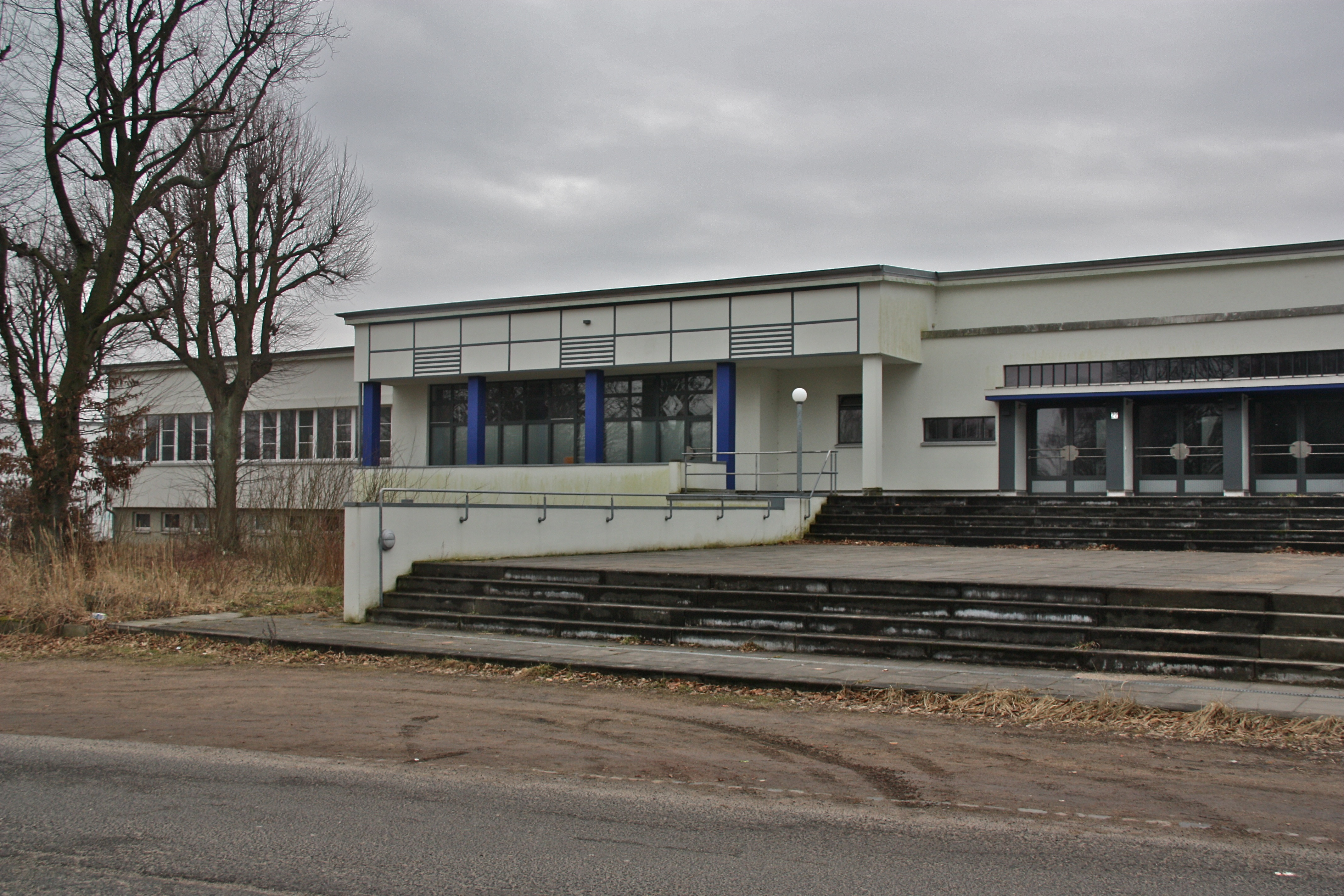 Hamburg, Niendorf, Künstlerhaus Sootbörn, linke Seite